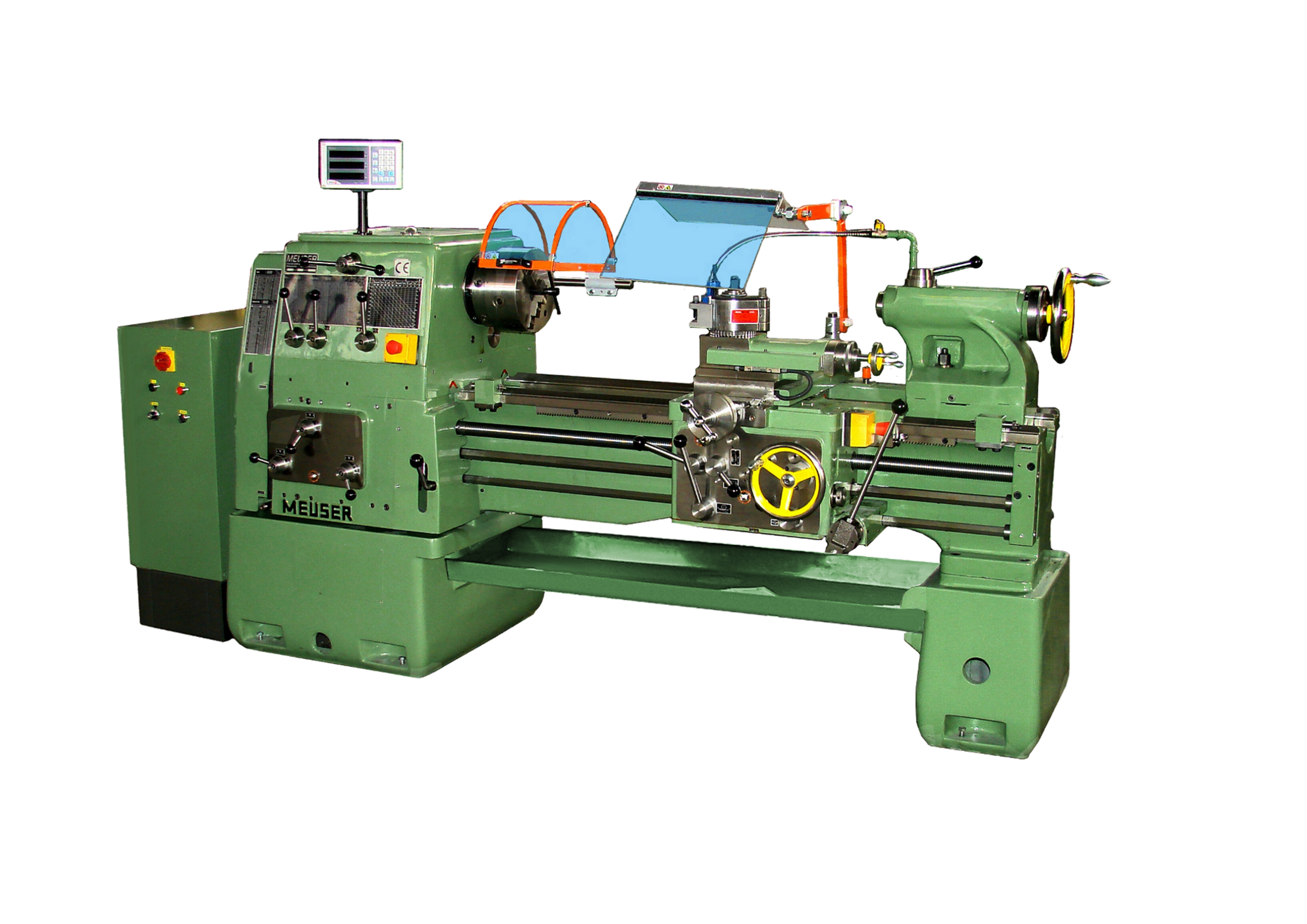 Meuser Drehmaschine M2L